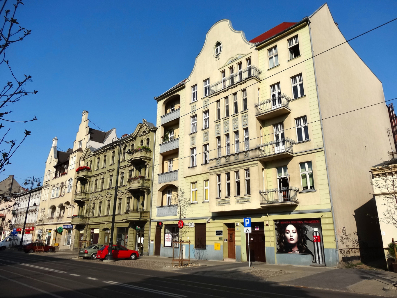 Ulica Gdańska w Bydgoszczy na odcinku od ul. Świętojańskiej do ul. Chocimskiej